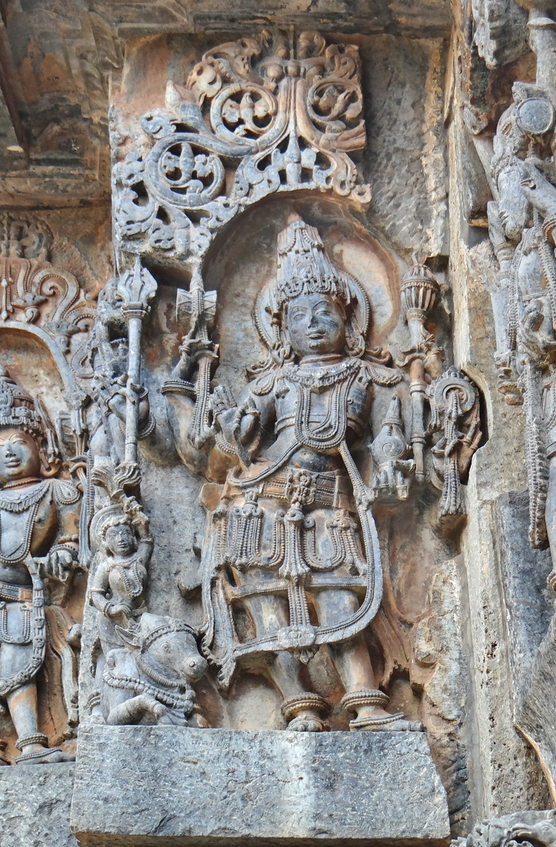 Divinité La ville d'Halebid a été la capitale du royaume des Hoysalas. Le temple de Hoysaleshwara a commencé à être construit en 1121 et les travaux se sont poursuivis durant des dizaines d'années. Ce temple dédié à Shiva est célèbre pour la qualité de ses reliefs et de ses sculptures. Le temple est composé de deux sanctuaires reliés entre eux par un couloir avec des fenêtres ouvragées, chacun comprenant un lingam, un mandapa et un taureau Nandi. L'édifice est construit sur une plateforme dont le plan est en étoile comme pour les autres temples hoysalas Les frises sculptées sur les murs extérieurs se développent en registres superposés. Les décors comprennent des dieux, des personnages mythologiques, des musiciens et danseuses, des animaux mythiques et réels et des motifs végétaux raffinés. Article de Wikipedia sur le temple de Hoysaleśvara